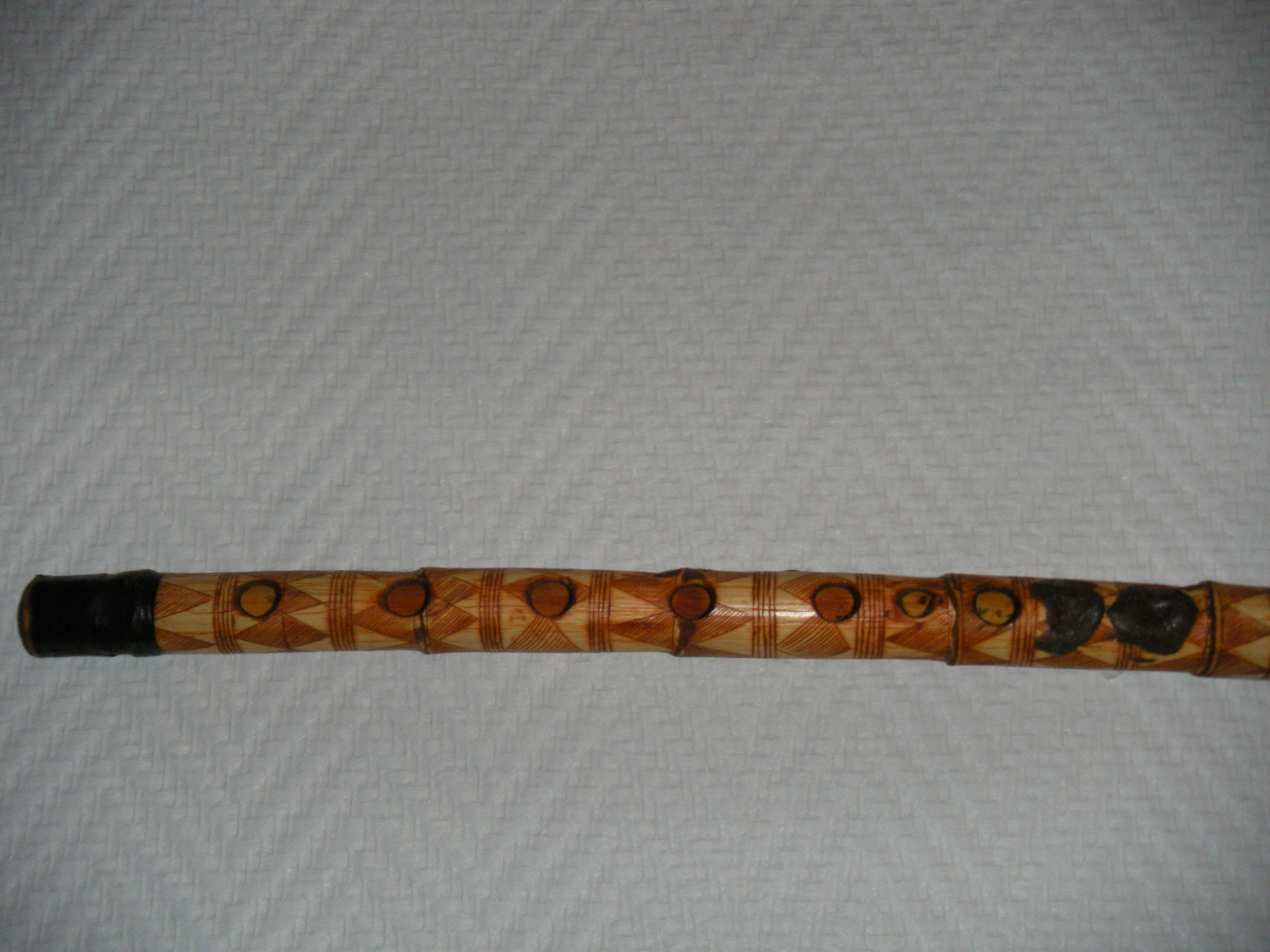 Description Flûte oblique Taghanimt chaouie des Aurès comportant 9 trous de jeu ou moins DateMay 2011SourceOwn work by the original uploaderAuthorNemencha Flûte oblique Taghanimt chaouie des Aurès comportant 9 trous de jeu ou moins